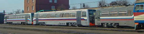 Автомотрисы РА1 модели 731 (слева ипо центру) и 730 (справа) в Калининграде